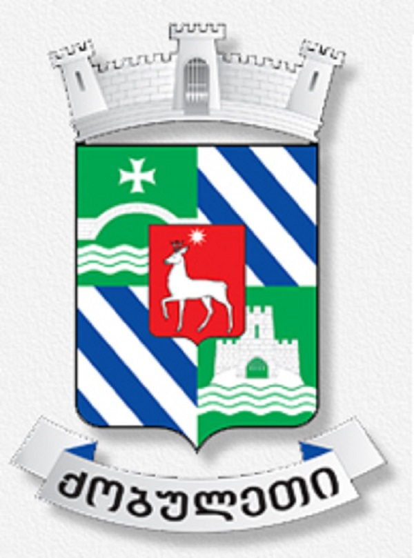 ქობულეთის მუნიციპალიტეტის გერბი